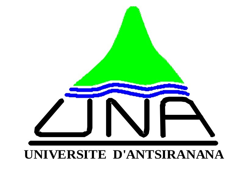 Nouveau Logo